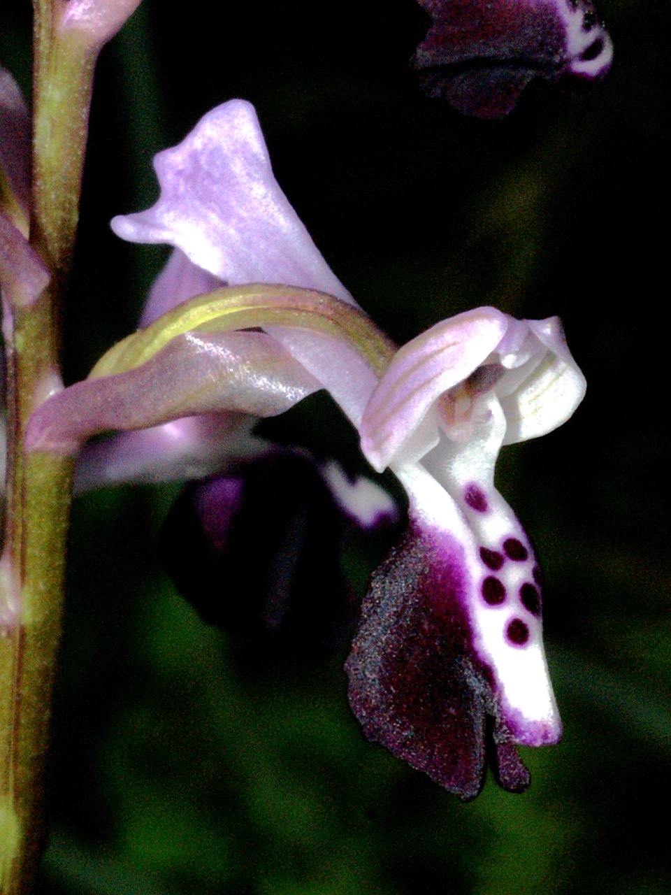 Anacamptis morio subsp. longicornu